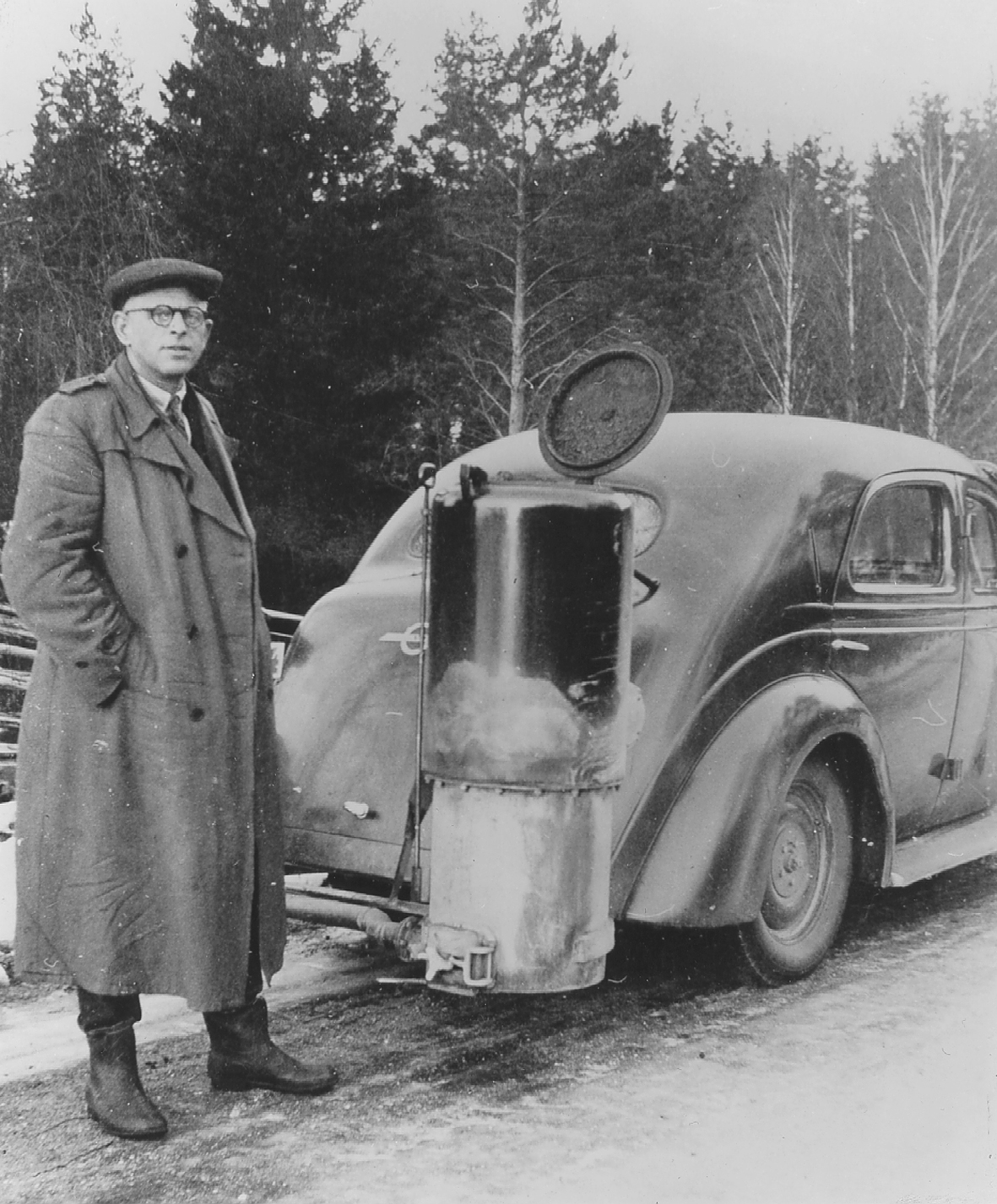 Vägmästare S E Abrahamsson, Målilla Kalmar län. Vid sin tjänstebil 1944.